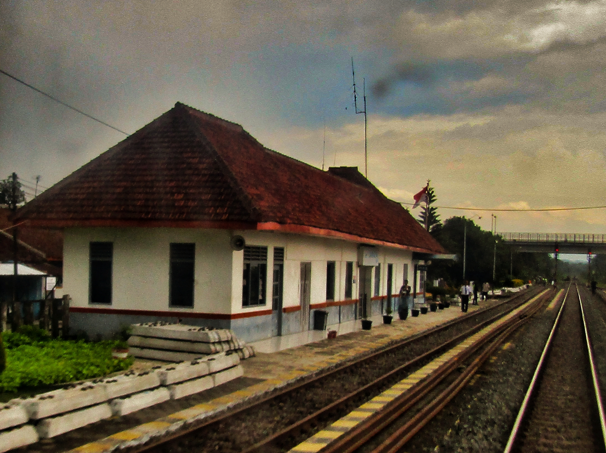 Bangunan utama Stasiun Langen, 2020